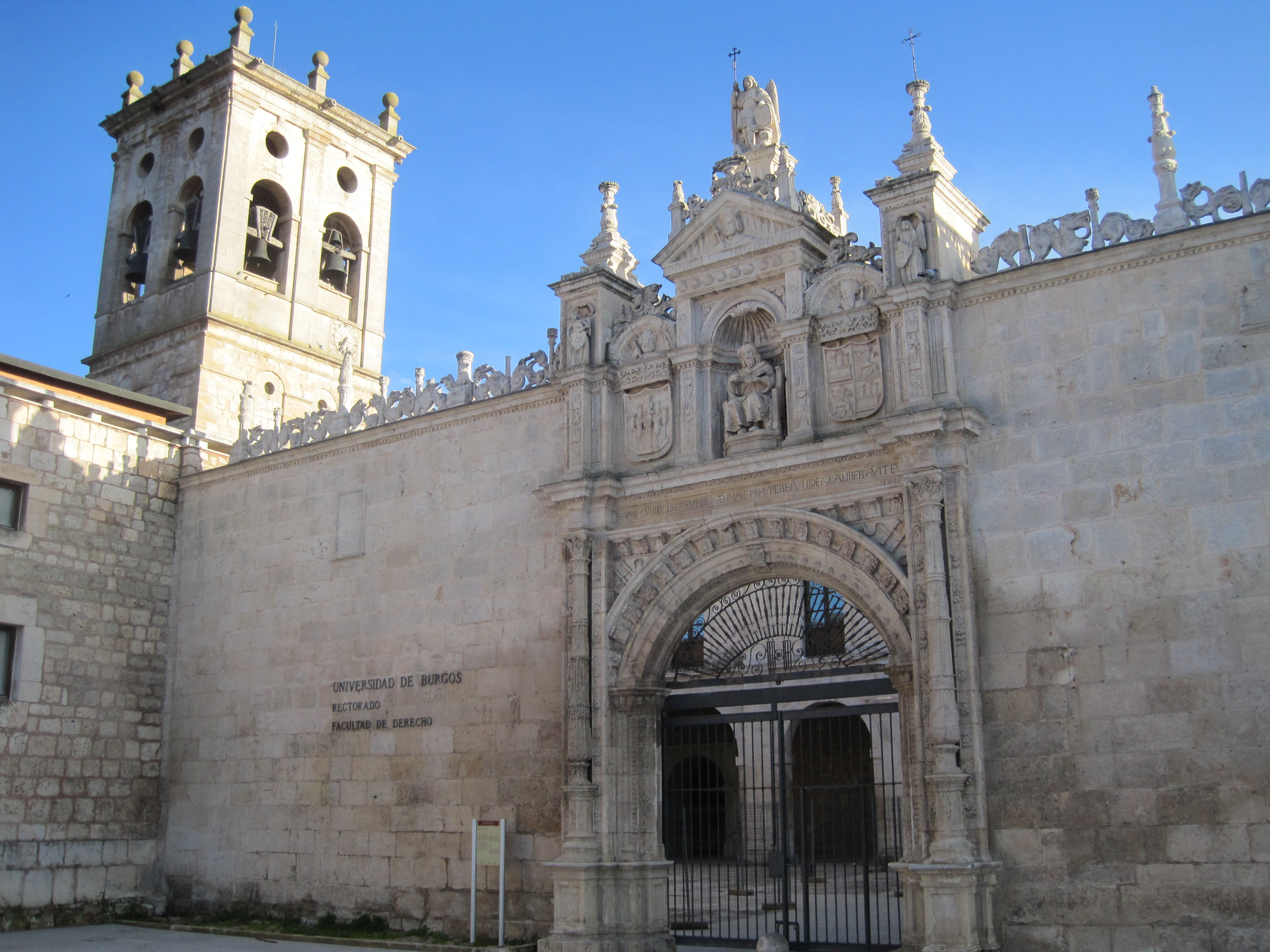 Fachada del edificio que algerga al rectorado de la UBU.